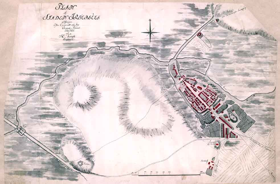 Tribsees mit Paß an der Trebel 1760